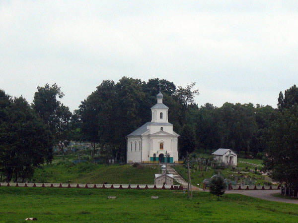 Сноў. Царква на могілках